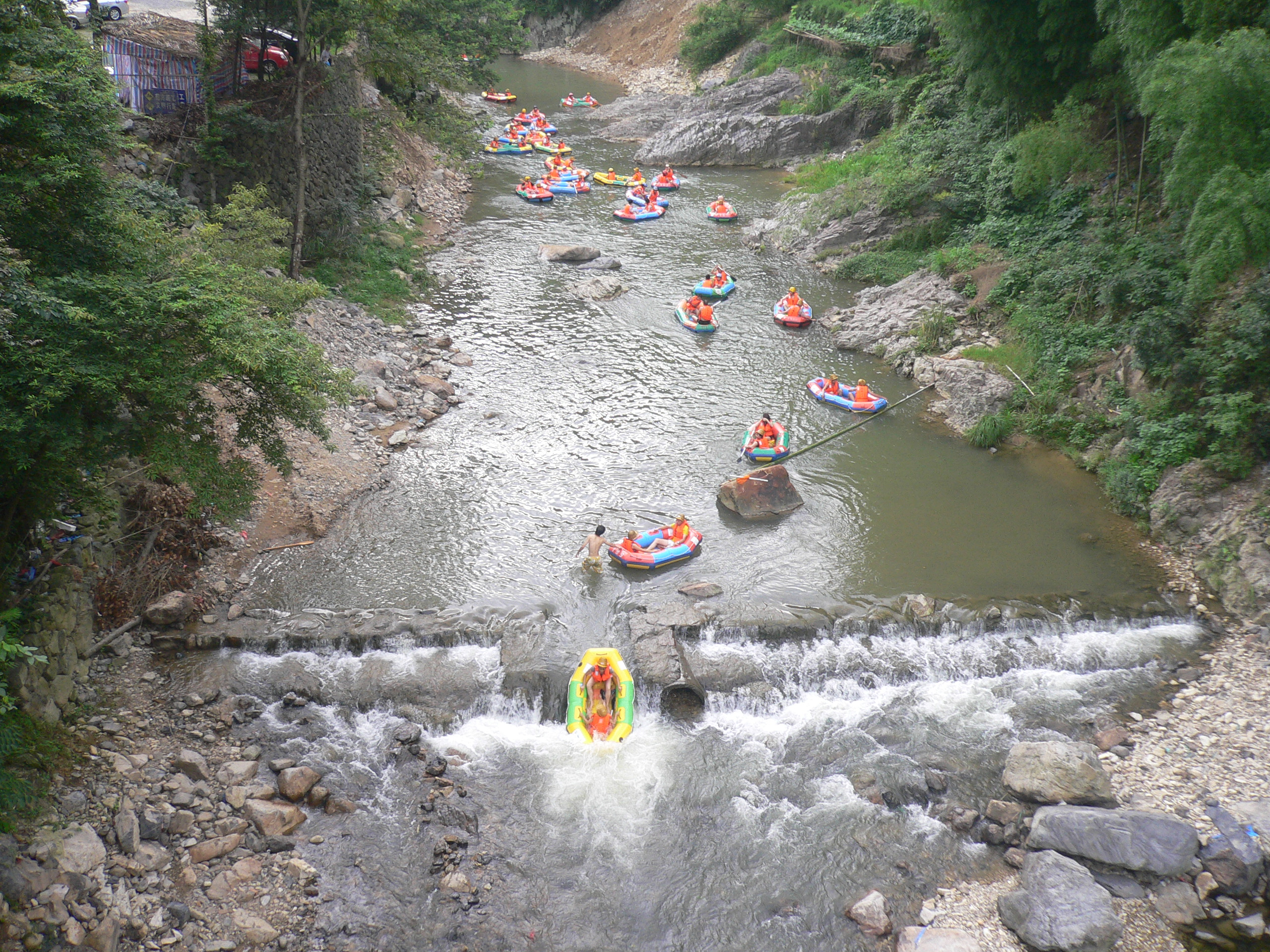 泽雅漂流